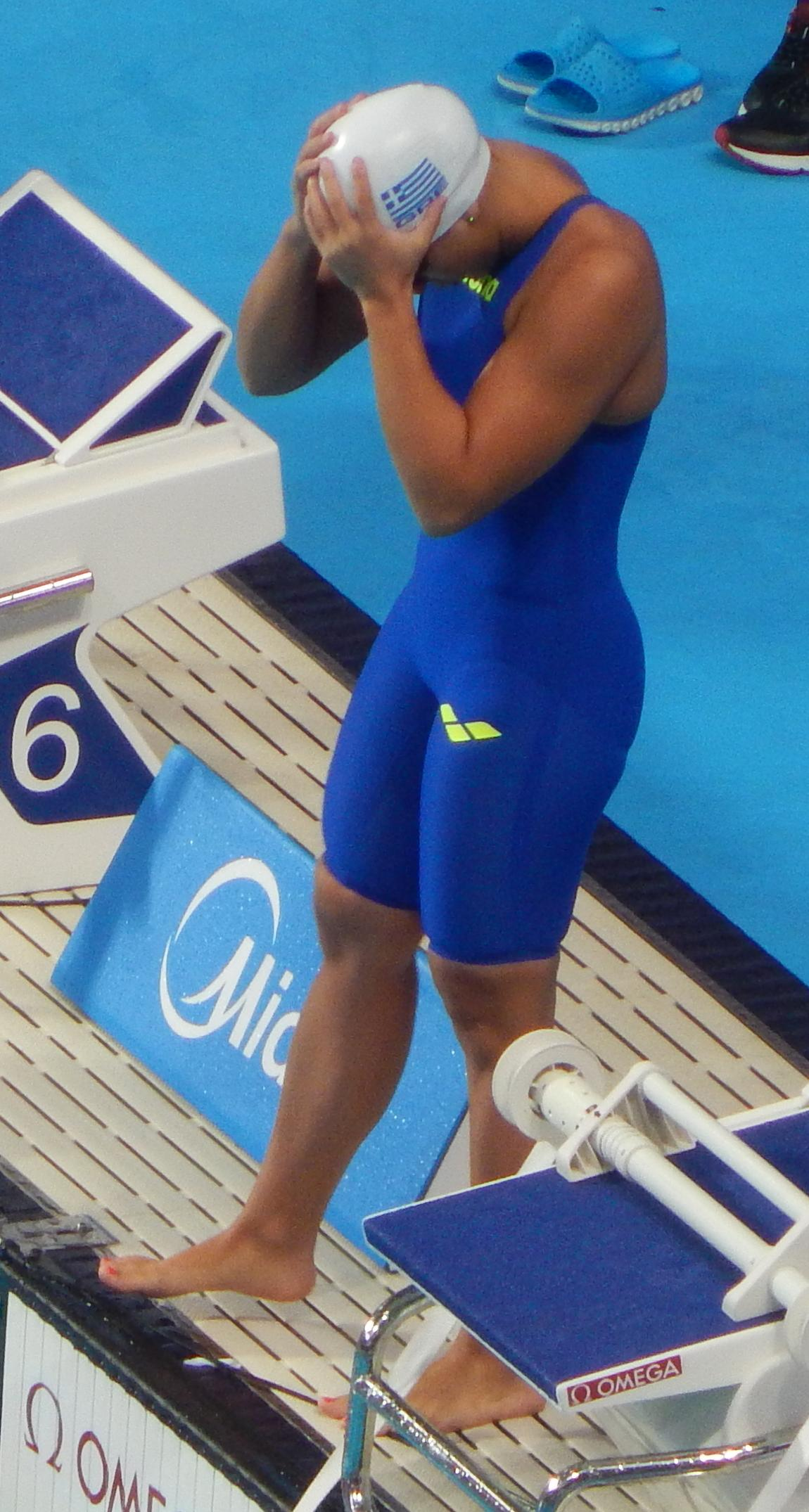 Теодора Драку перед полуфиналом 50 метров на спине в Казани на чемпионате мира